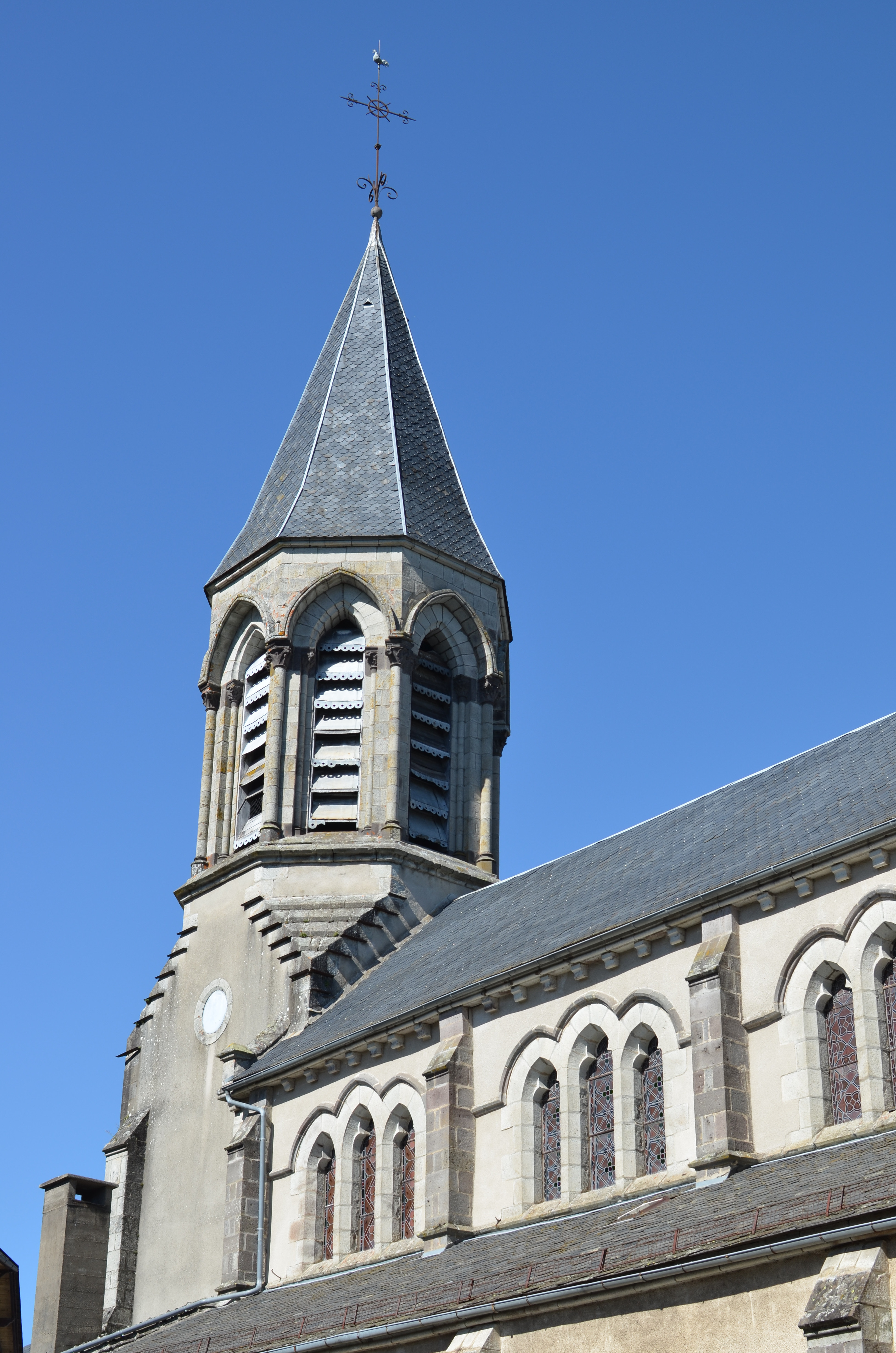 Clocher de l'église Saint-Nazaire à Condat dans le département du Cantal.